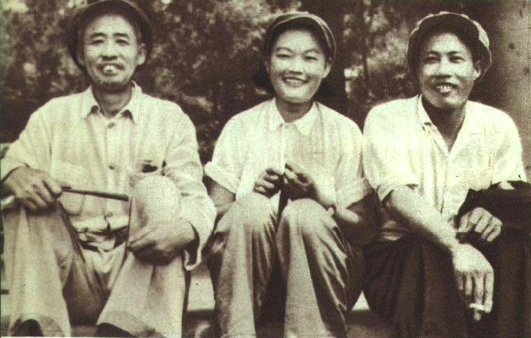 1950年赵占魁、李凤莲、甄荣典合影，全国劳模代表大会